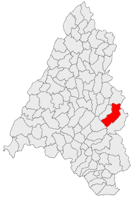 Categorie:Hărţi ale judeţului Bihor